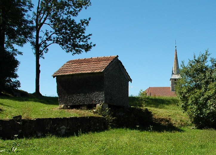 Grenier Fort Jurassien à Longchaumois